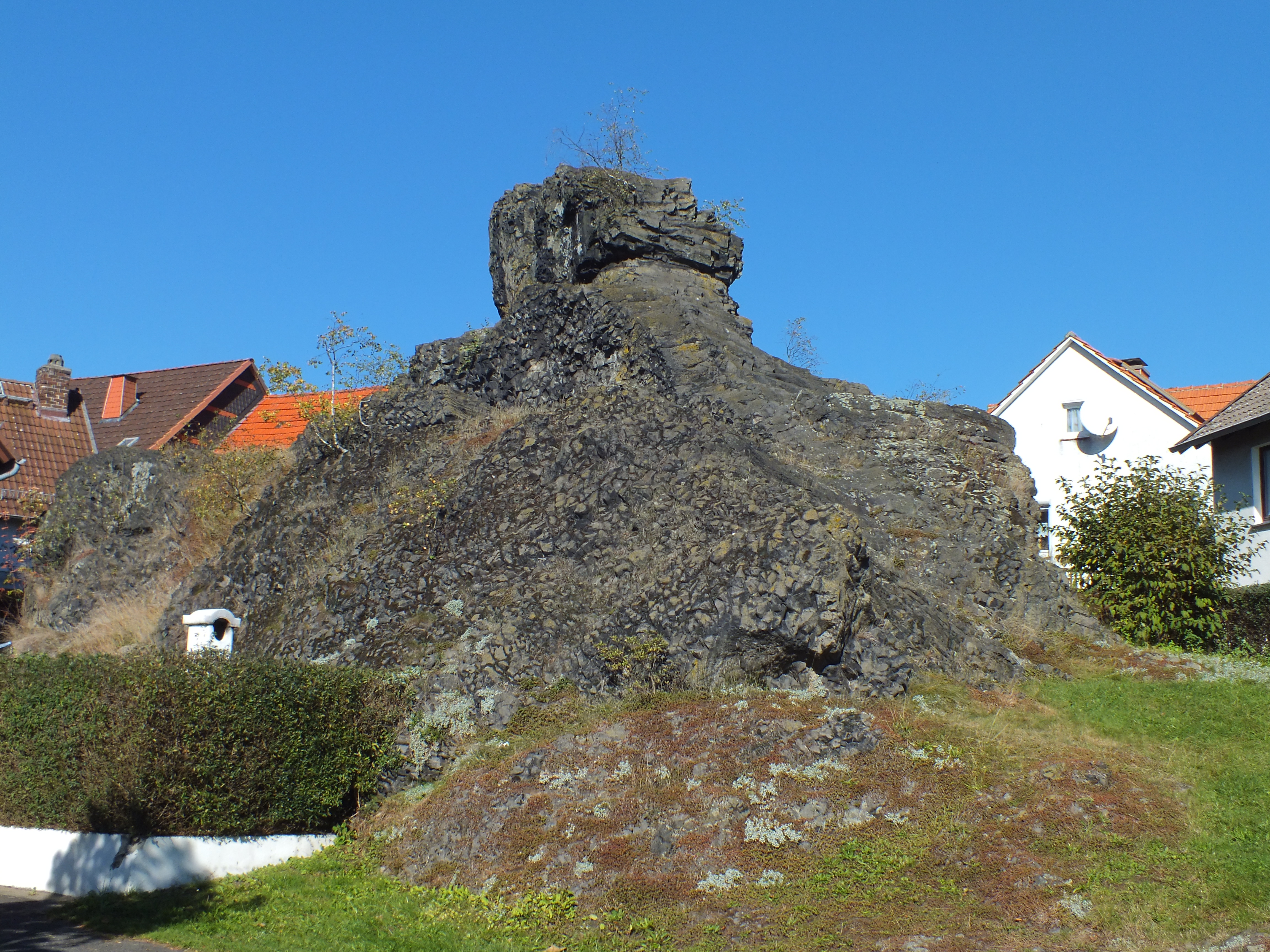 Das Wahrzeichen von Schauenburg-Martinhagen.